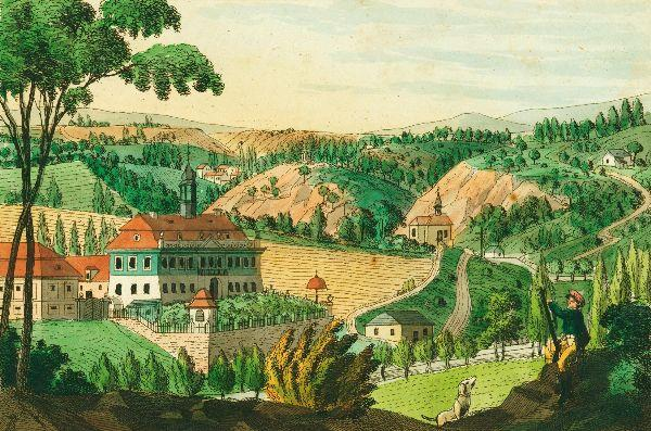 Jeneralka